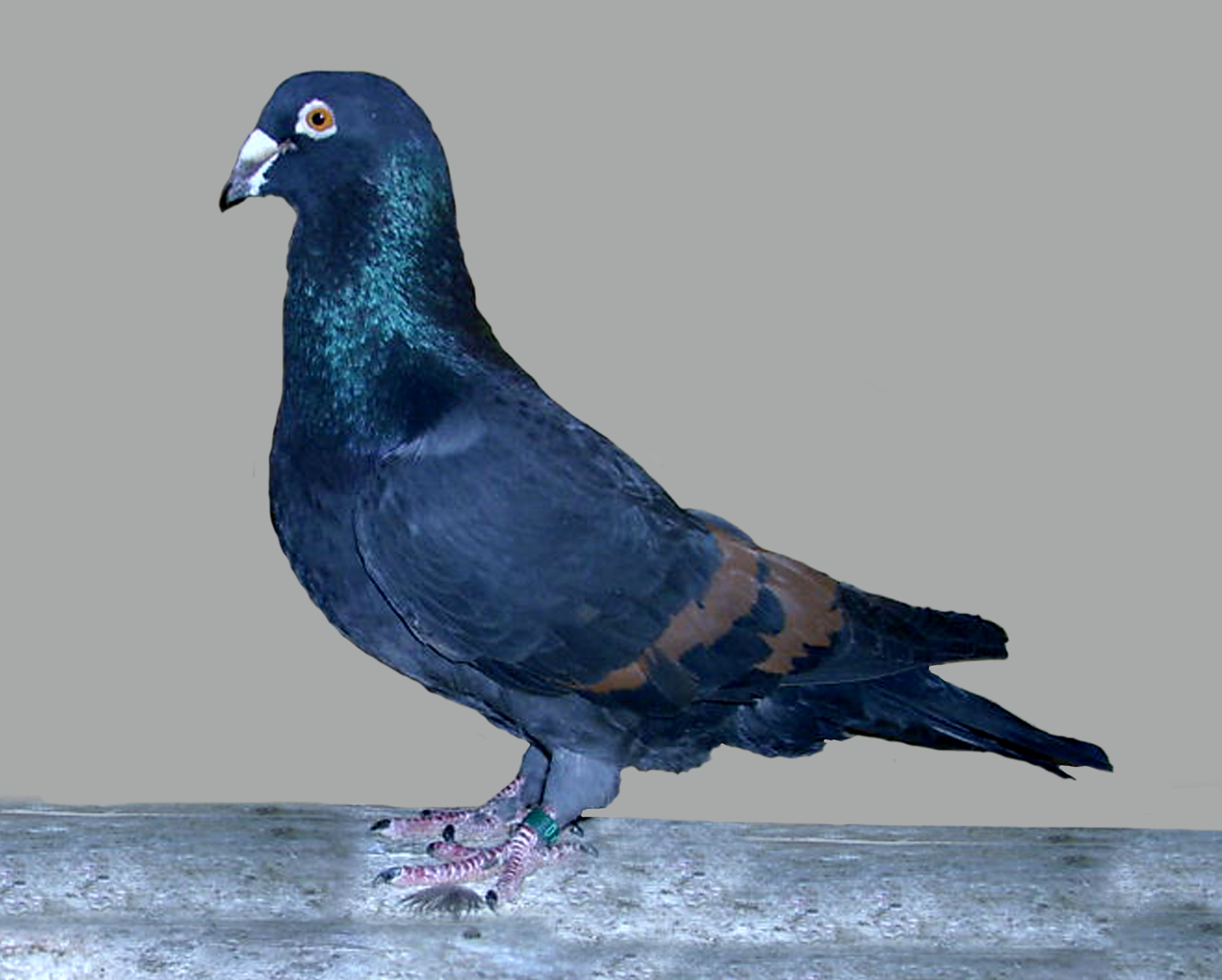 Lebanon (Umari-Bronze Barred)